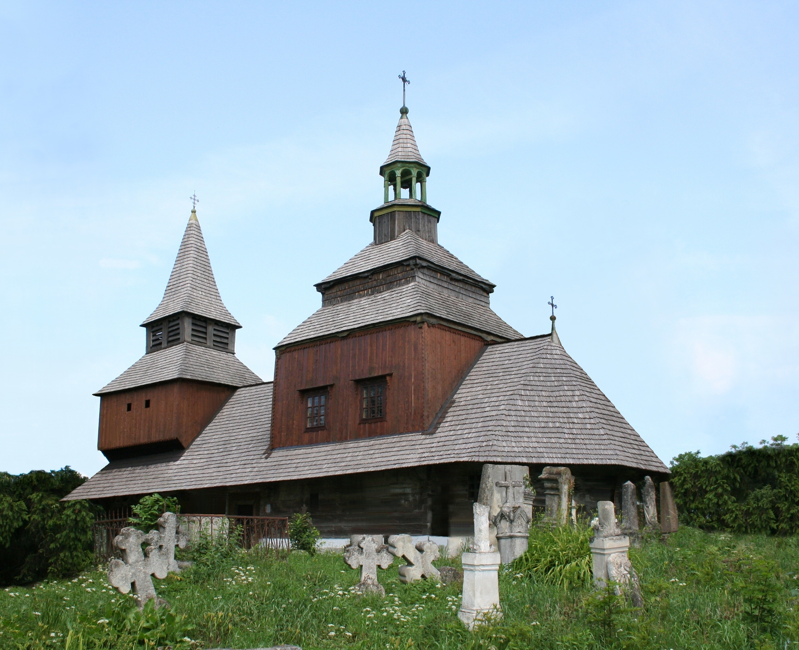 церква св. Духа